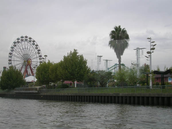 Parque de la Costa - Tigre - Buenos Aires - Argentina